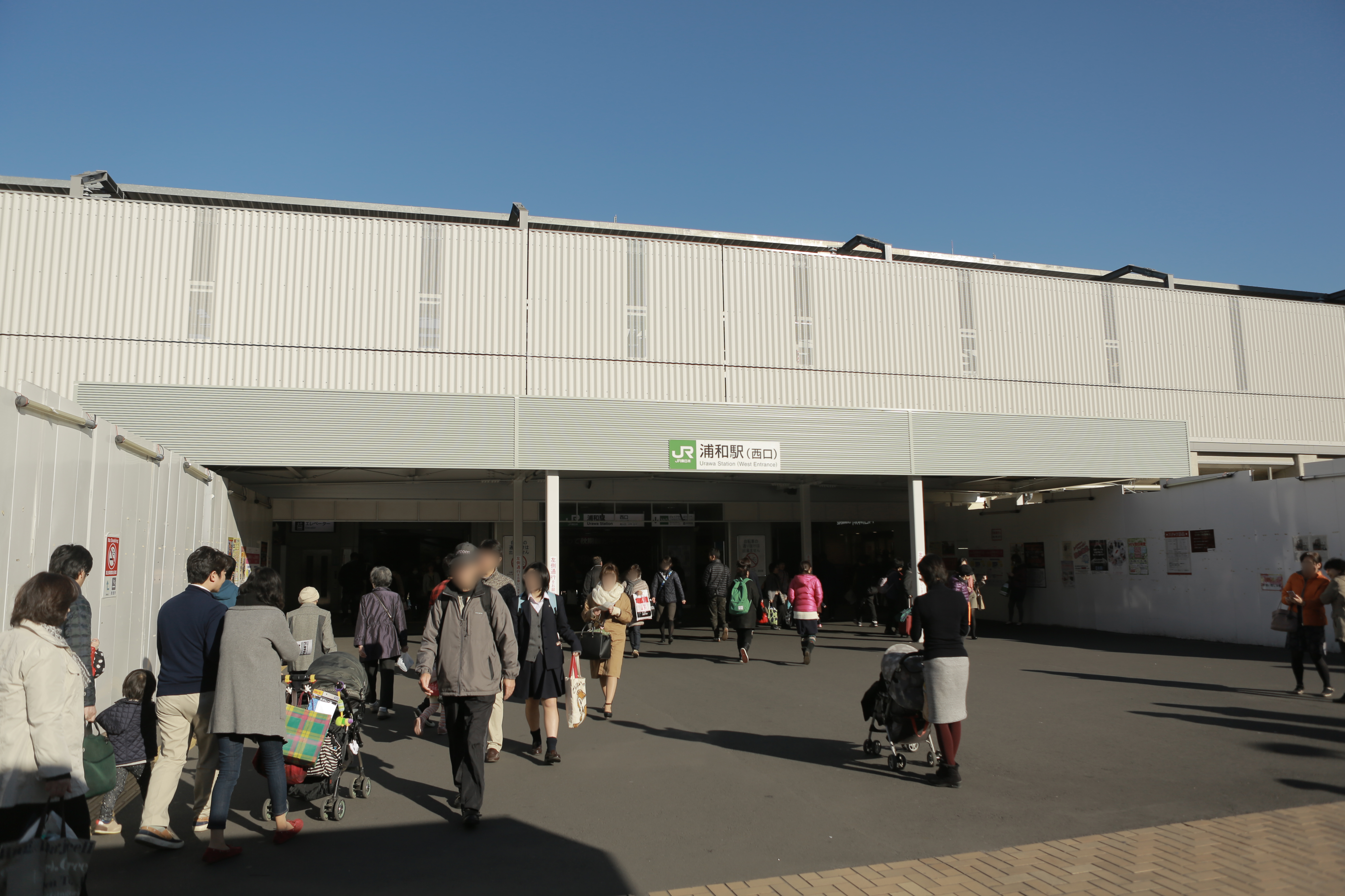 浦和駅西口仮設出口